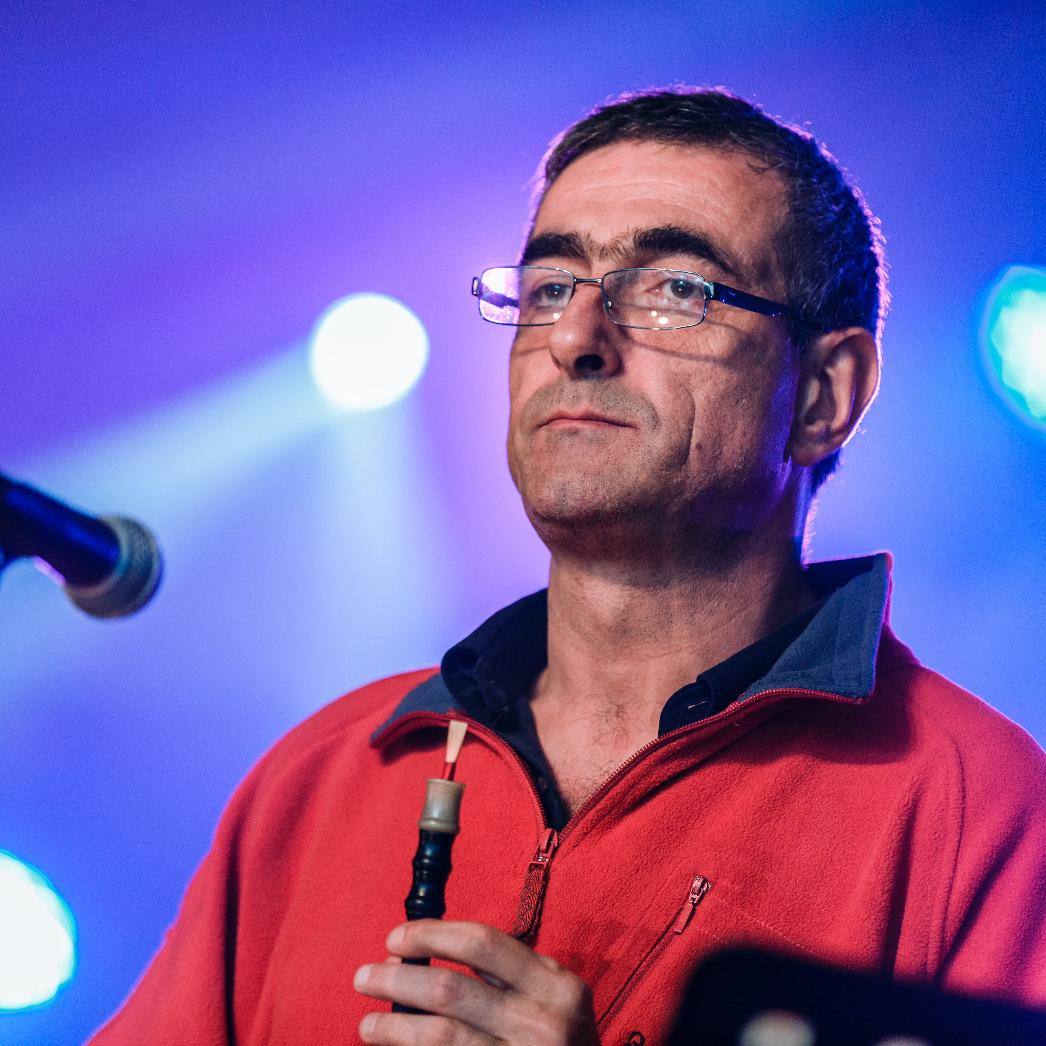 André Le Meut en concert lors du festival de Cornouaille place St-Corentin à Quimper le 21 juillet 2017.